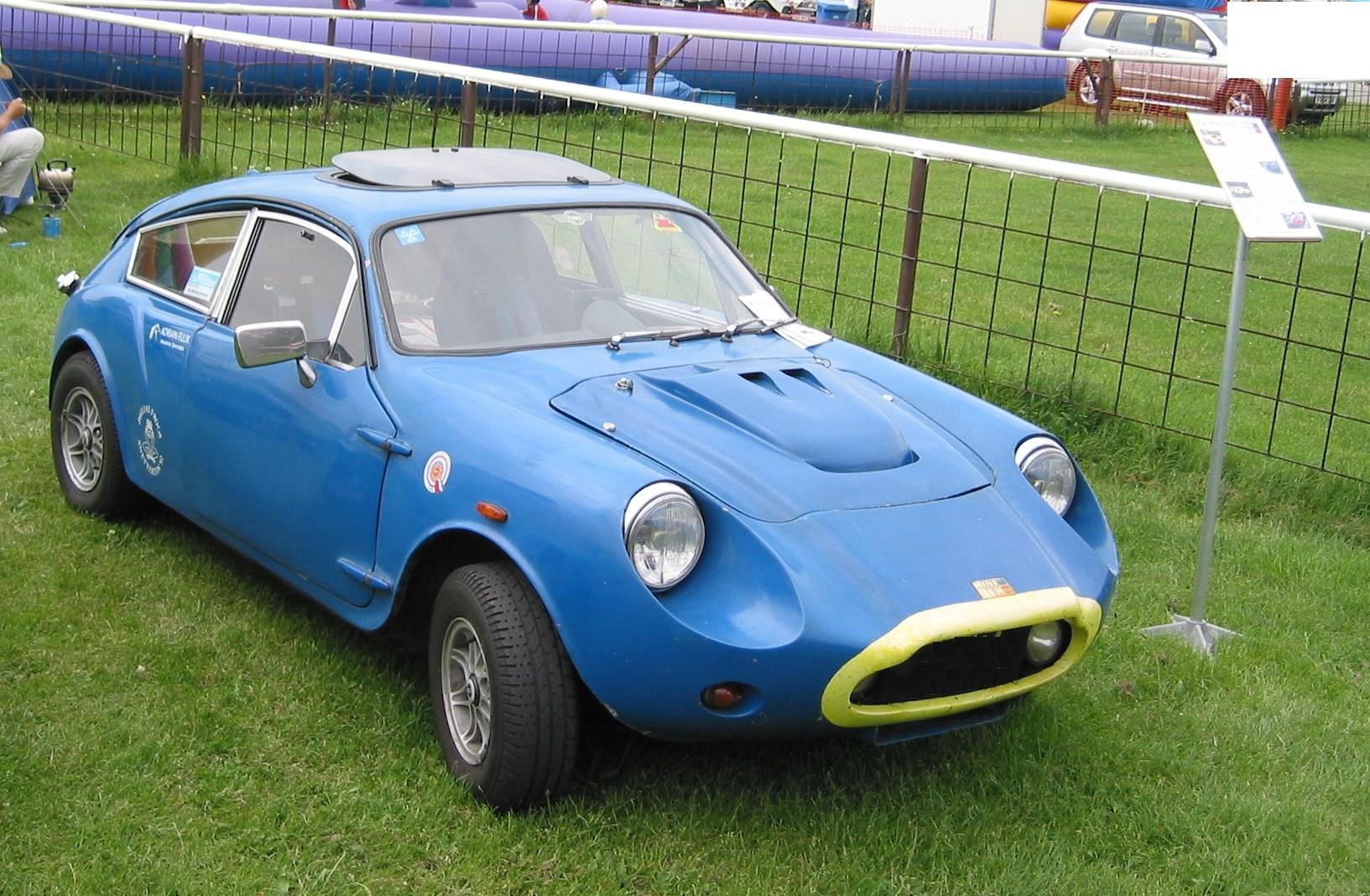 Minijem 1971-1972